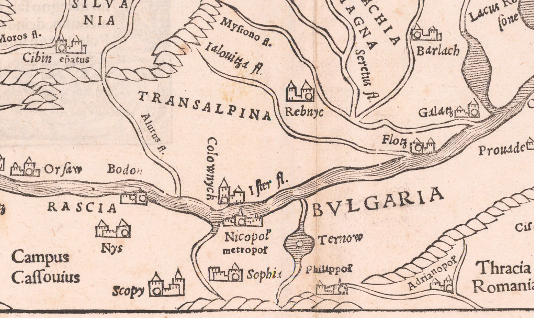 Sebastian Münster (1540) - Polonia et Ungaria XV Nova Tabula - detail